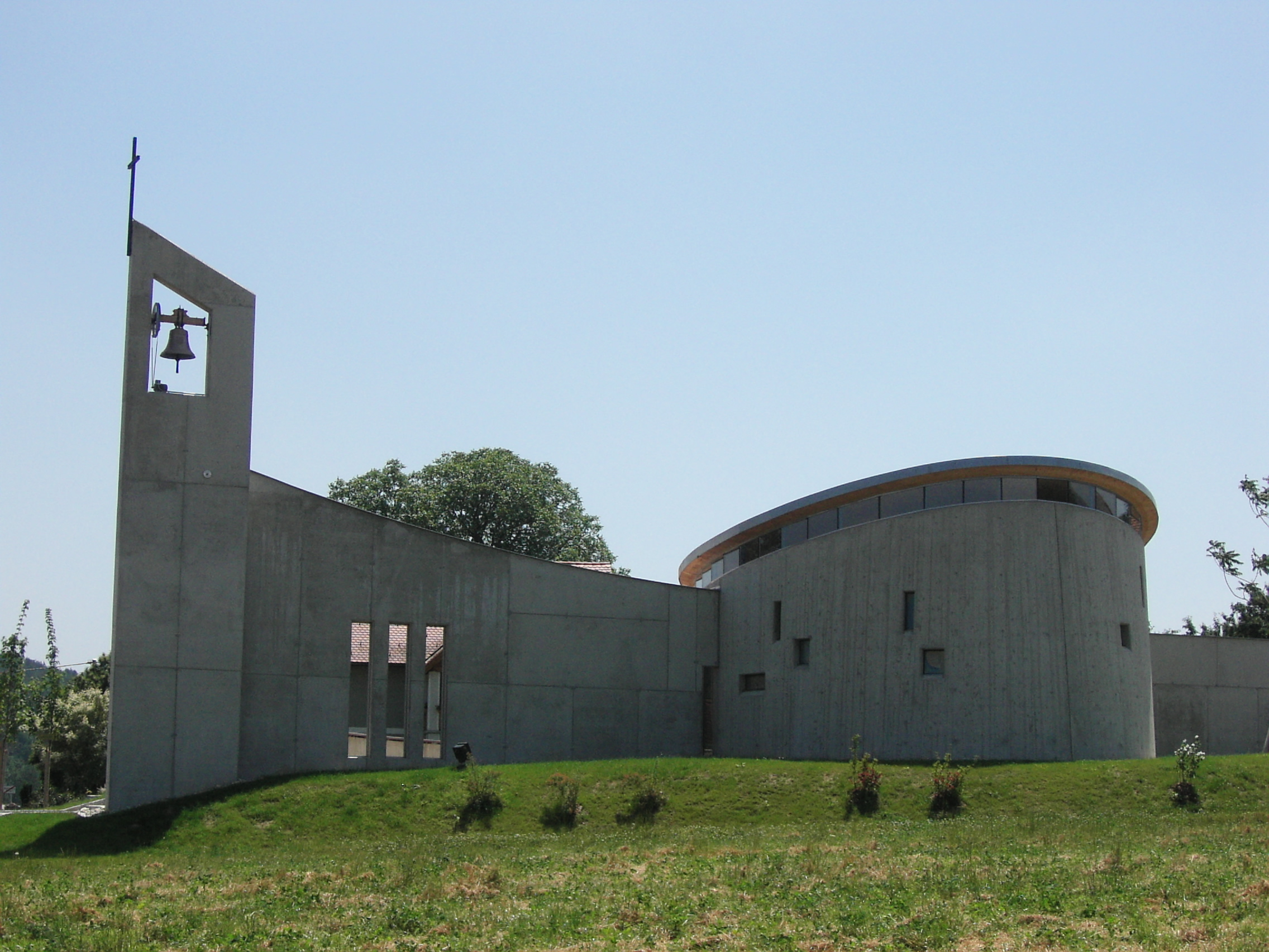 Hartl, Engelskapelle 4